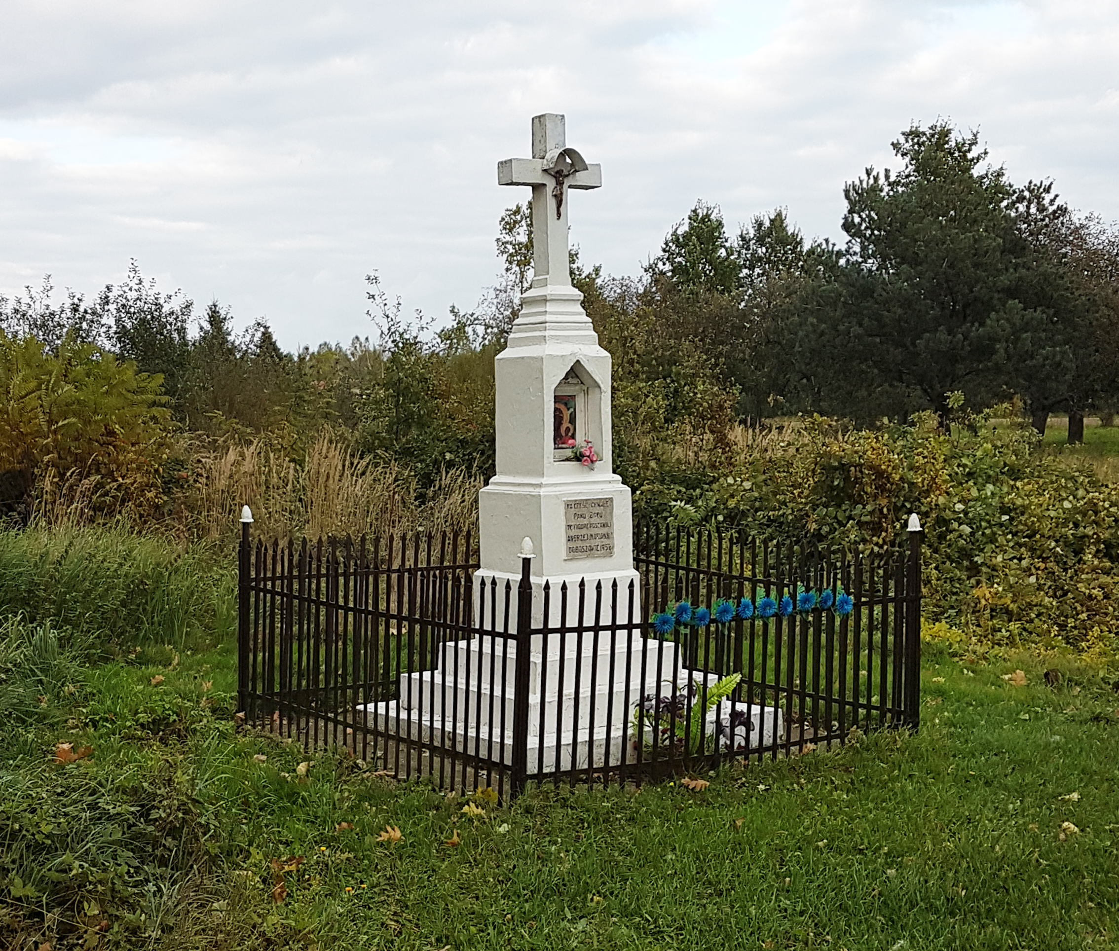 Kapliczka w miejscowości Narty w gminie Jedlińsk